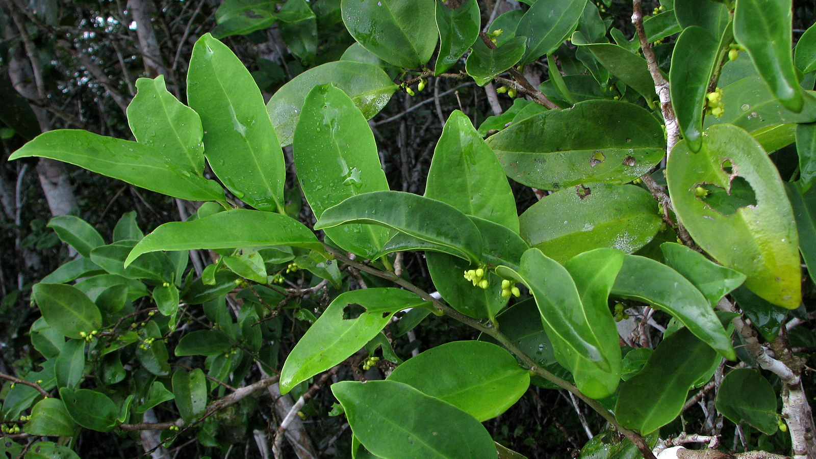 Schoepfia brasiliensis A. DC.